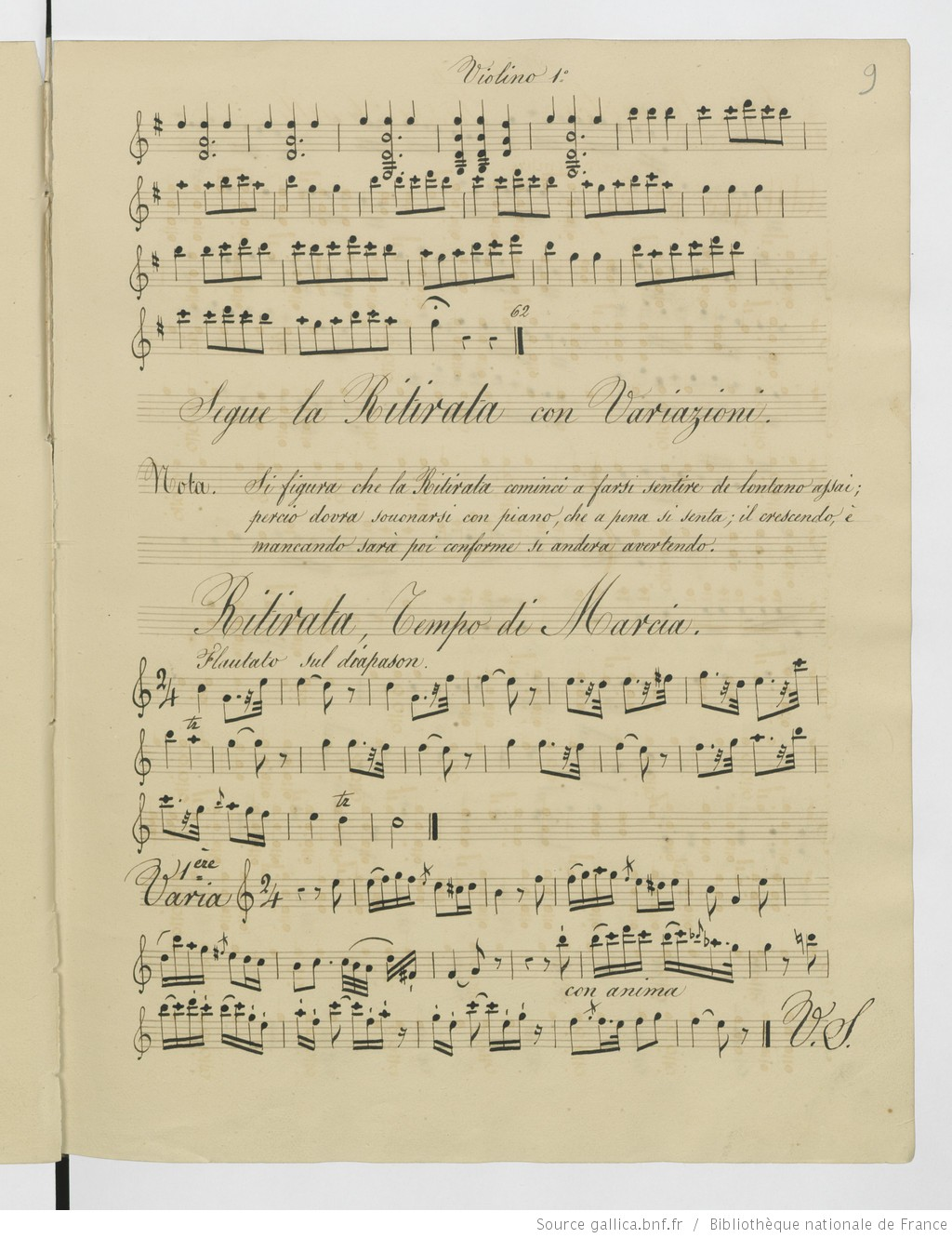 Page manuscrite de la Ritirata de La Musica delle strade di Madrid.